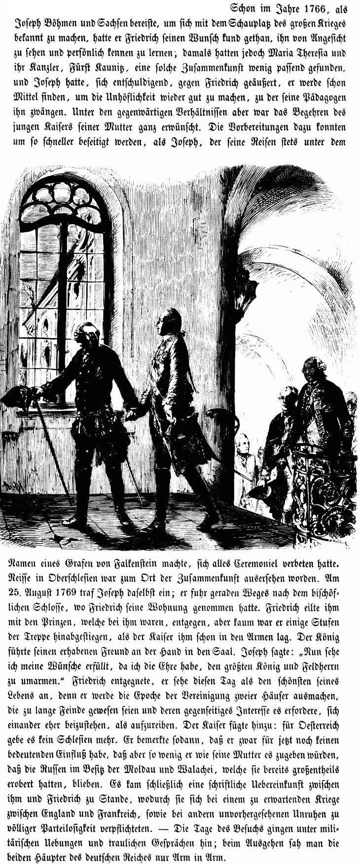 Franz Kugler (1840): Begegnung Friedrichs II. und Josephs II. 1769 in Neiße; Illustration von Adolph Menzel